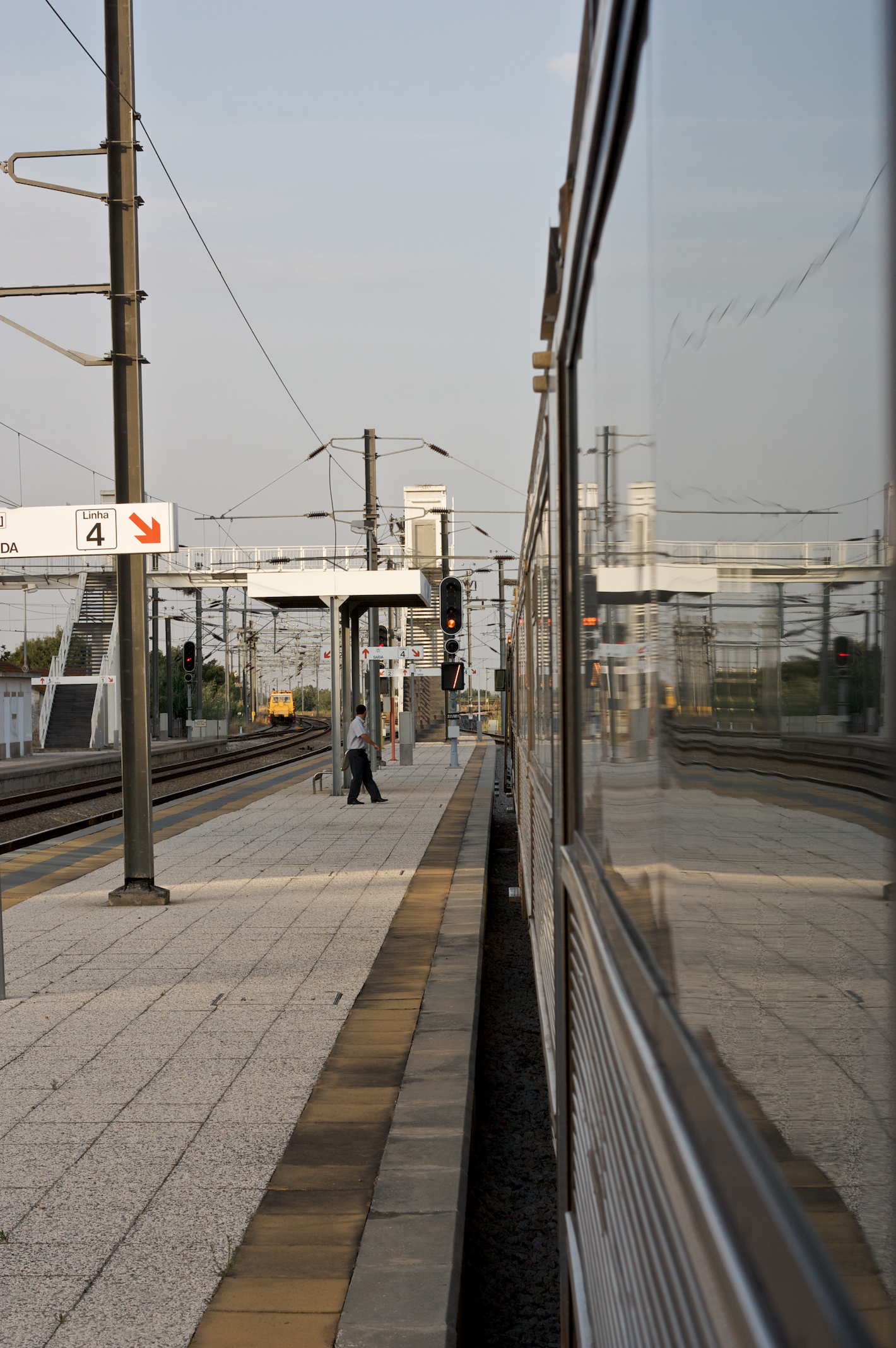 Tipo: Comboio Regional 4907 [Setil - Coruche] Local: Estação do Setil [Linha do Norte, PK 56 • Linha de Vendas Novas, PK 0,0] Data e hora: 8 de Setembro de 2009 [18h50] Material: Automotora 2282 [Unidade Tripla Eléctrica]